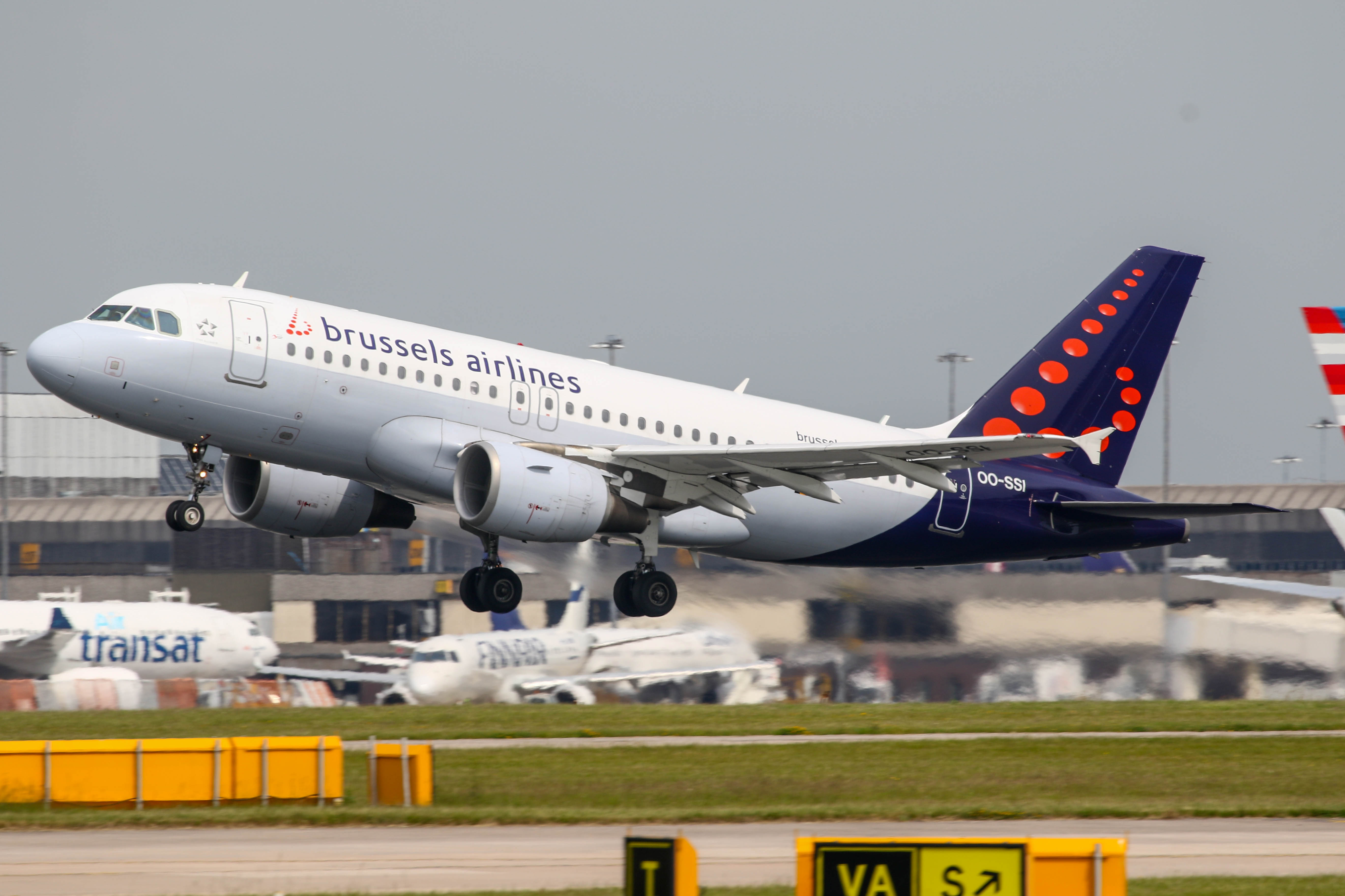 Brussels Airlines A319 OO-SSI